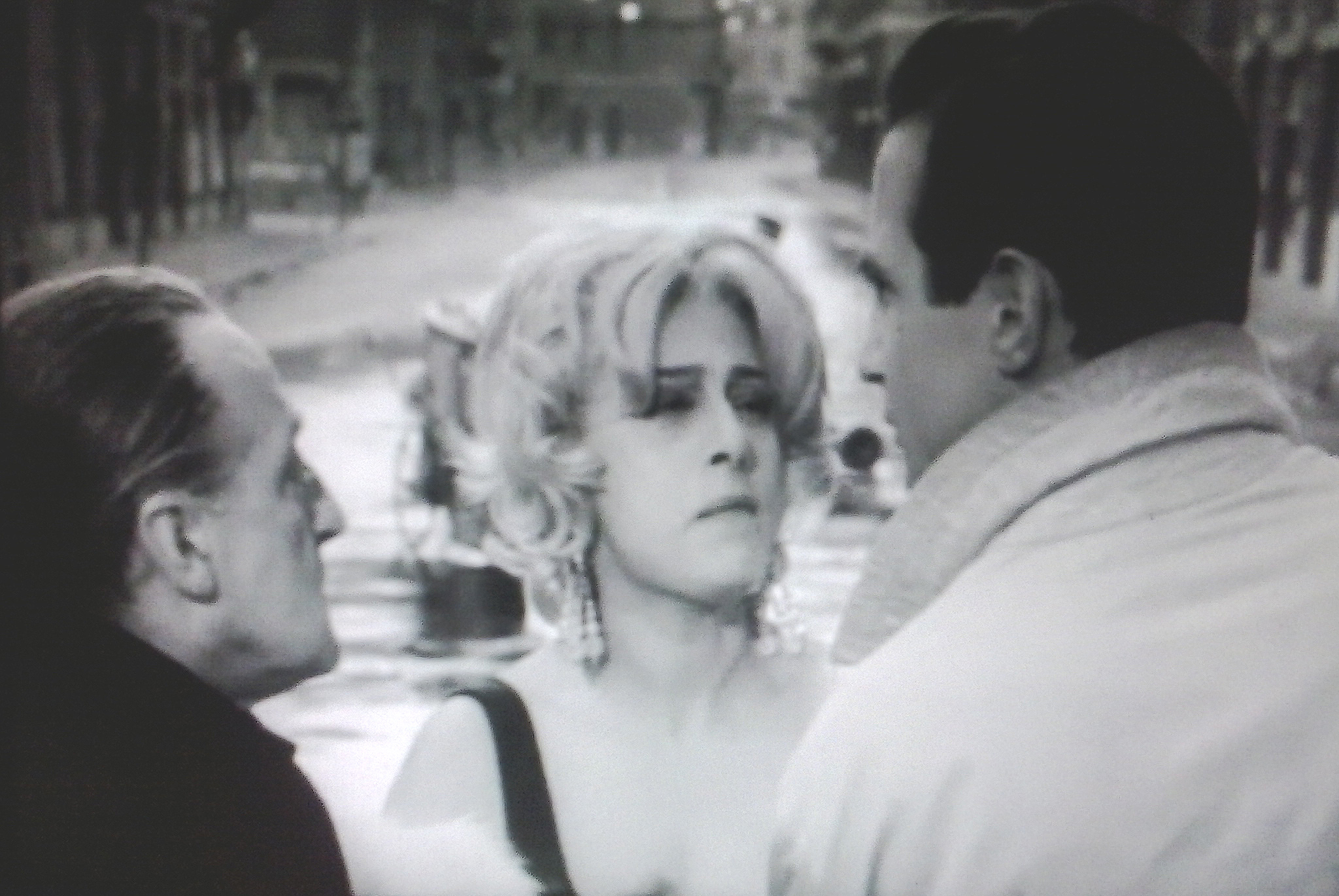 Totò, Anna Magnani e Ben Gazzarra nel film "Risate di gioia" diretto nel 1960 da Mario Monicelli